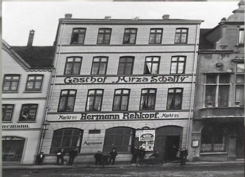 Almaniyanın Drezden şəhərində 1897-ci ildə istehsal edilmiş Mirzə Şəfi adlı siqaret brendi.